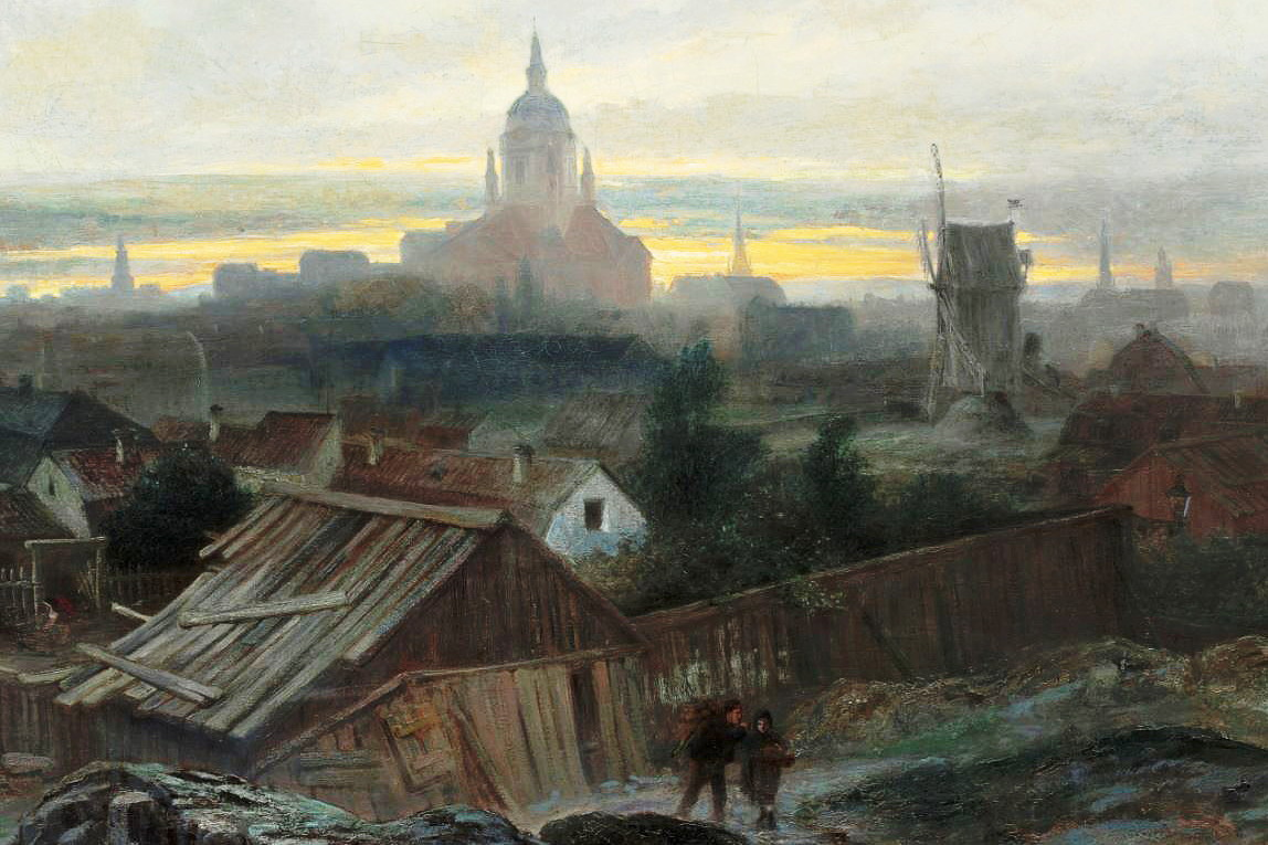 Utsikt från Vita Bergen i riktning mot Katarina kyrka och stolpkvarnen "Tjärbeljan" t.h. (utsnitt)